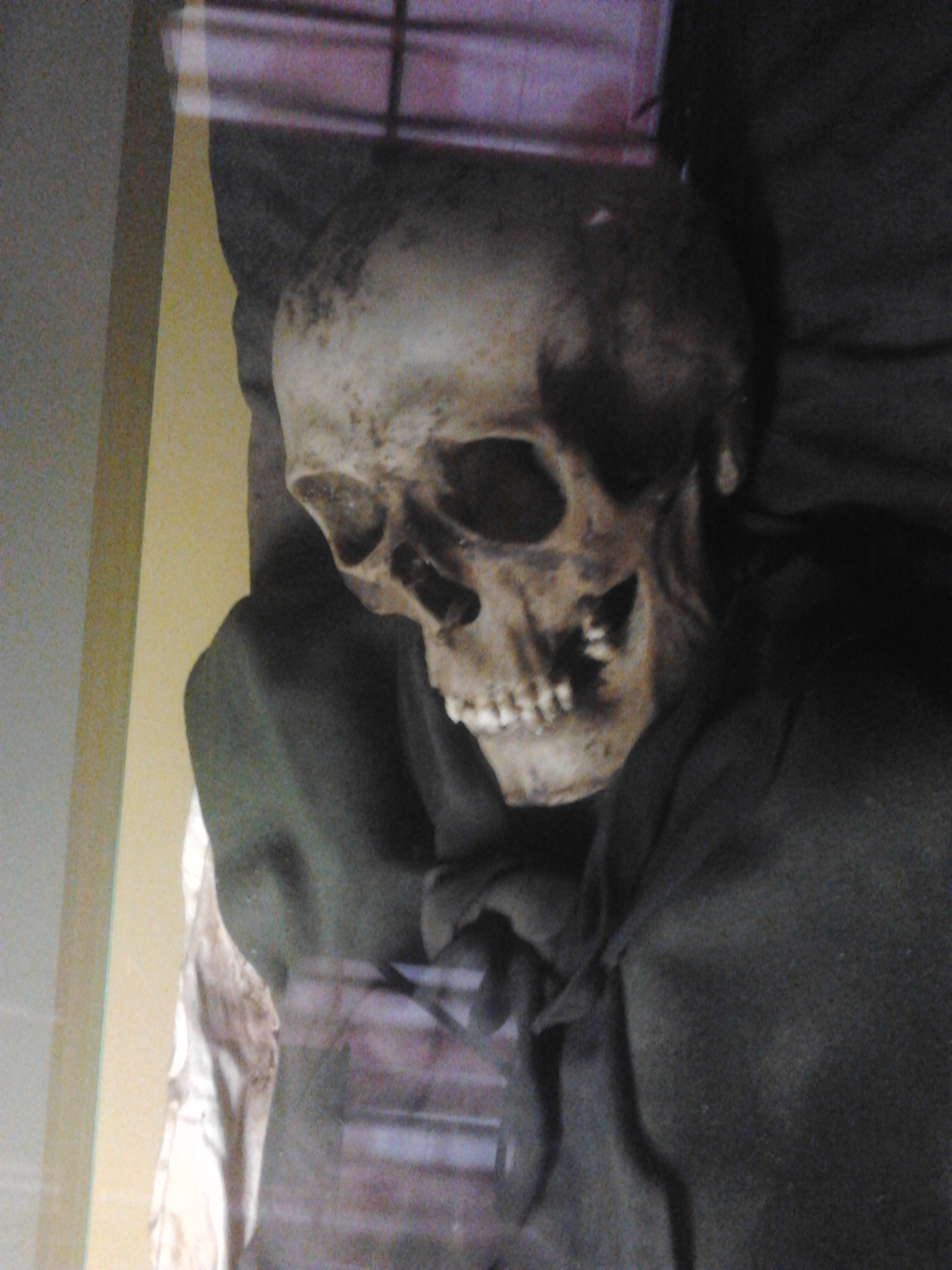 A váci múmiák közül az egyik.